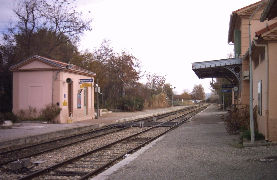 La gare de Meyrargues (Bouches-du-Rhône) sur la ligne Marseille - Briançon, vue côté voies.